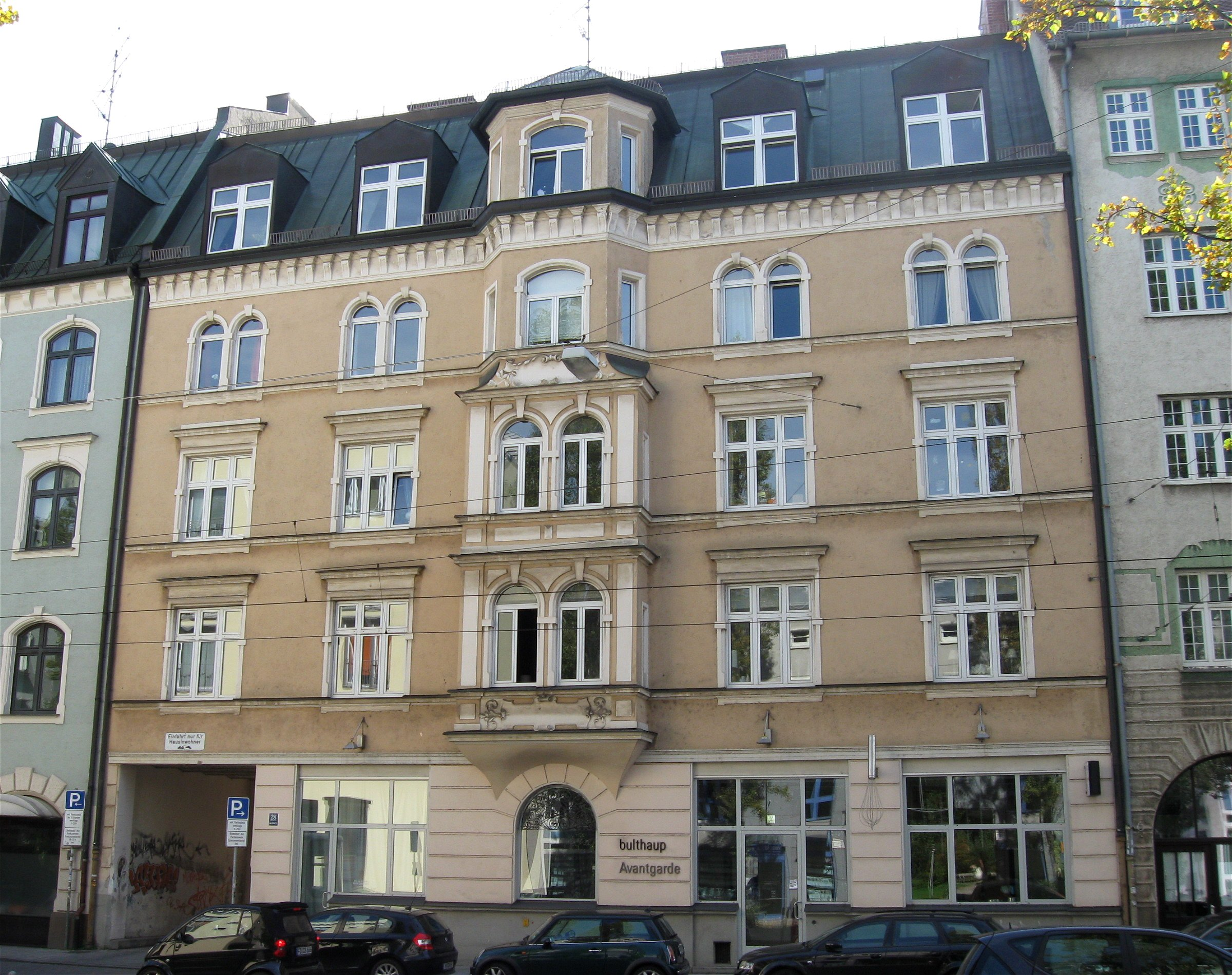 Innere Wiener Straße 28; Mietshaus, deutsche Renaissance, mit Erker, um 1900.